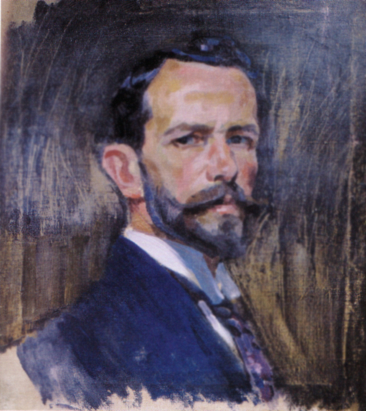 Self-portrait